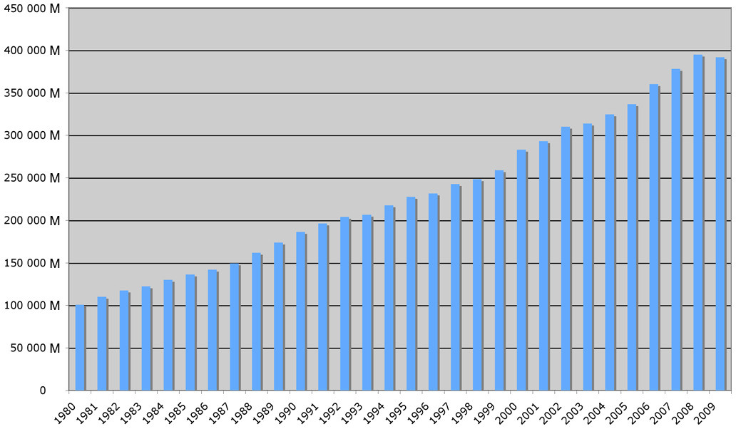 Graphique de l'évolution du PIB belge depuis 1980 jusque 2009